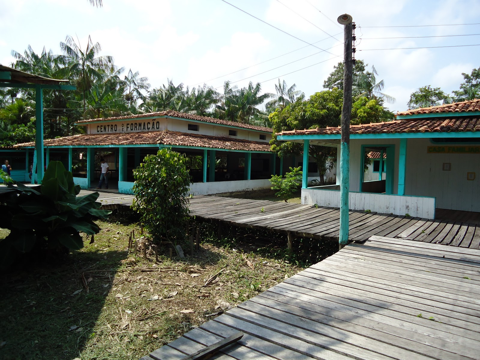 Mutirão